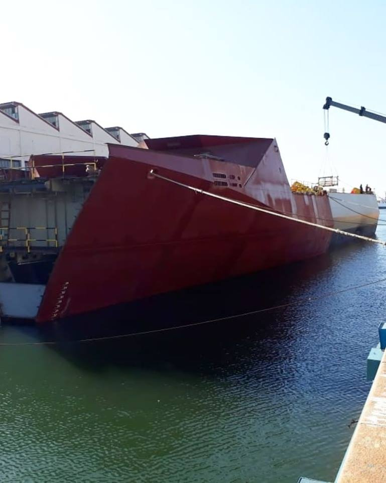 Patrullera Oceanica de Largo Alcance Mexico POLA Armada de mexico